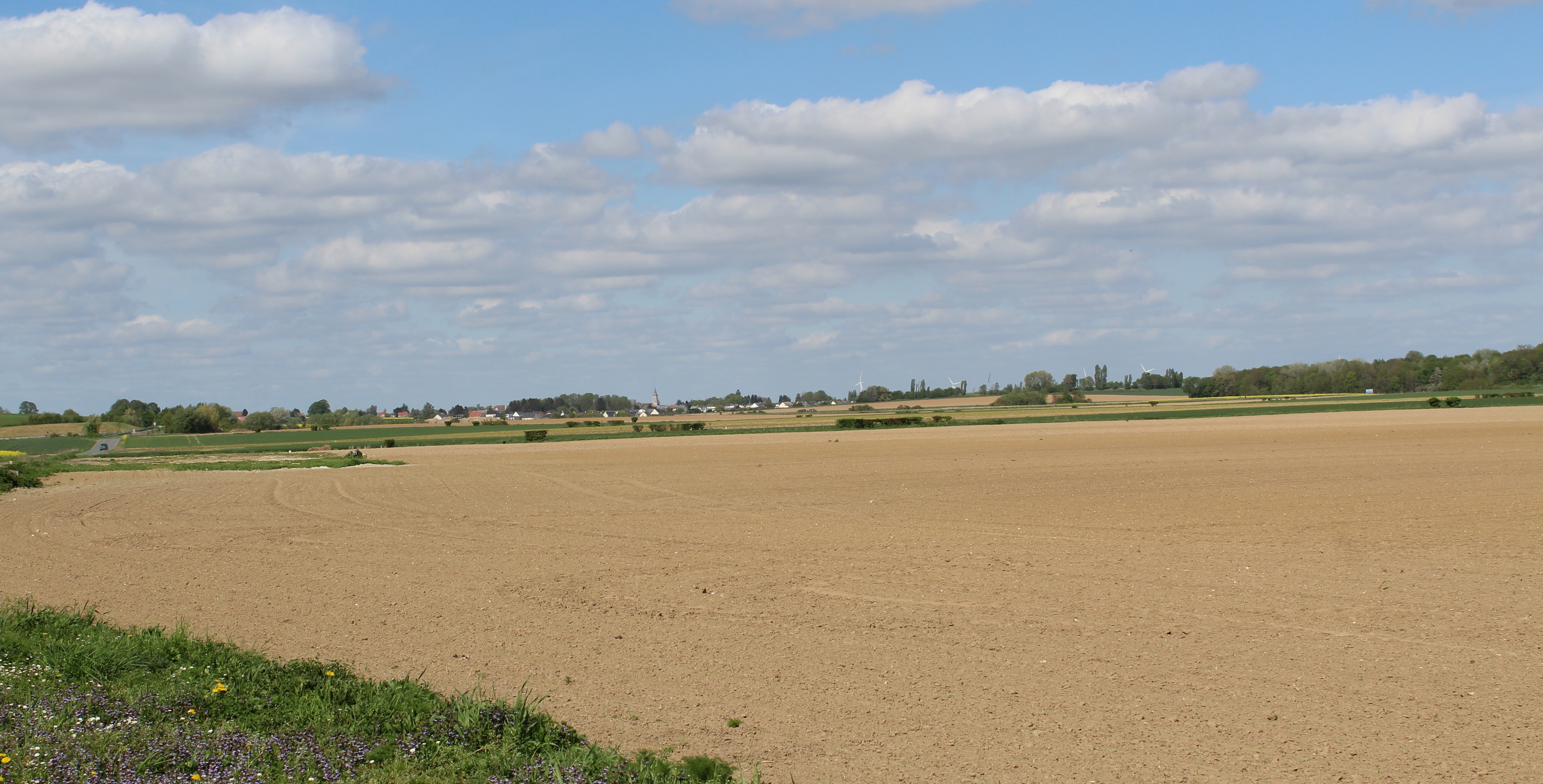 Vue panoramique du village.